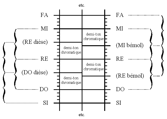 Description : Demi-ton et commas Source : Personnelle Licence : GFDL